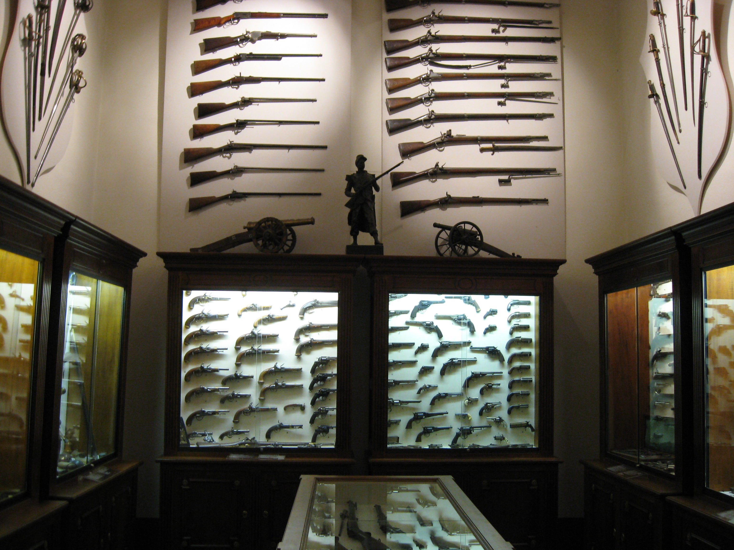 Musée Goya in Castres